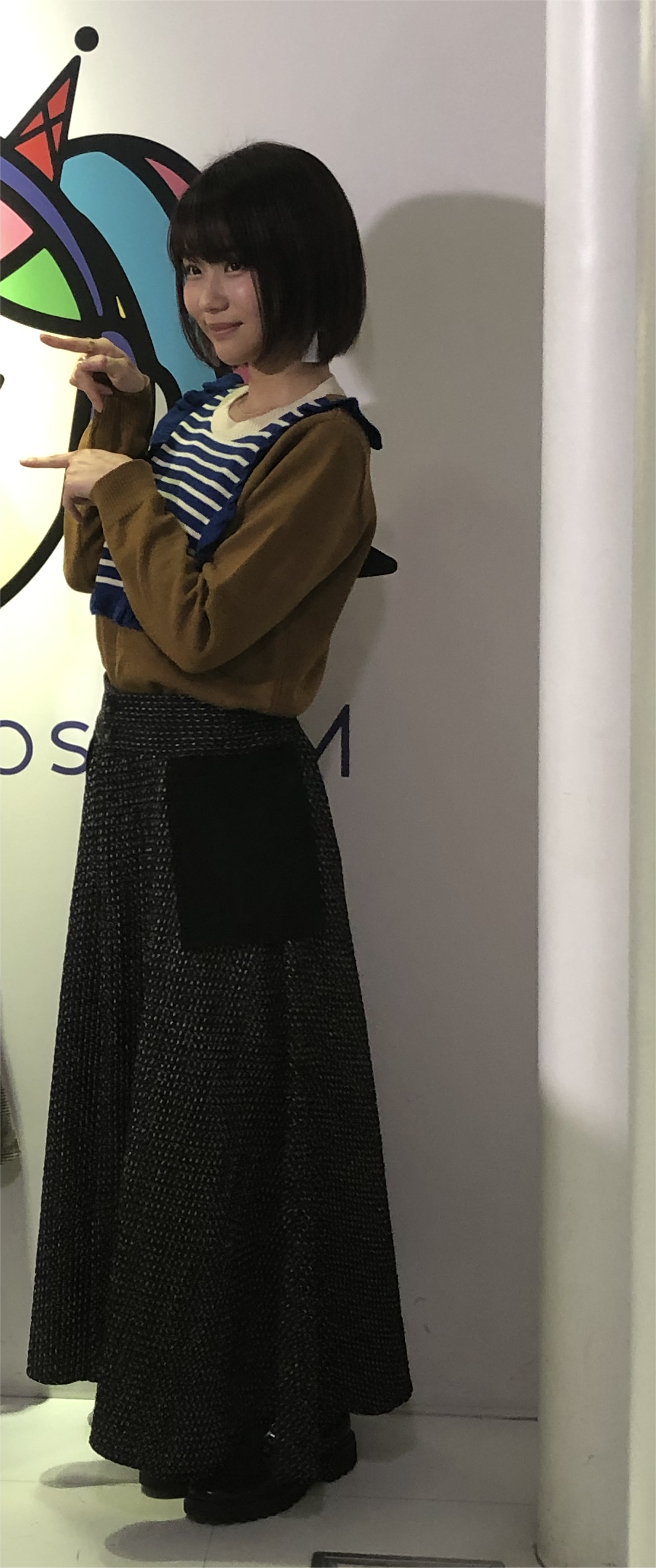 2019.02.22 渋谷クロスFM「水原ゆきのみなラジオ」パーソナリティ